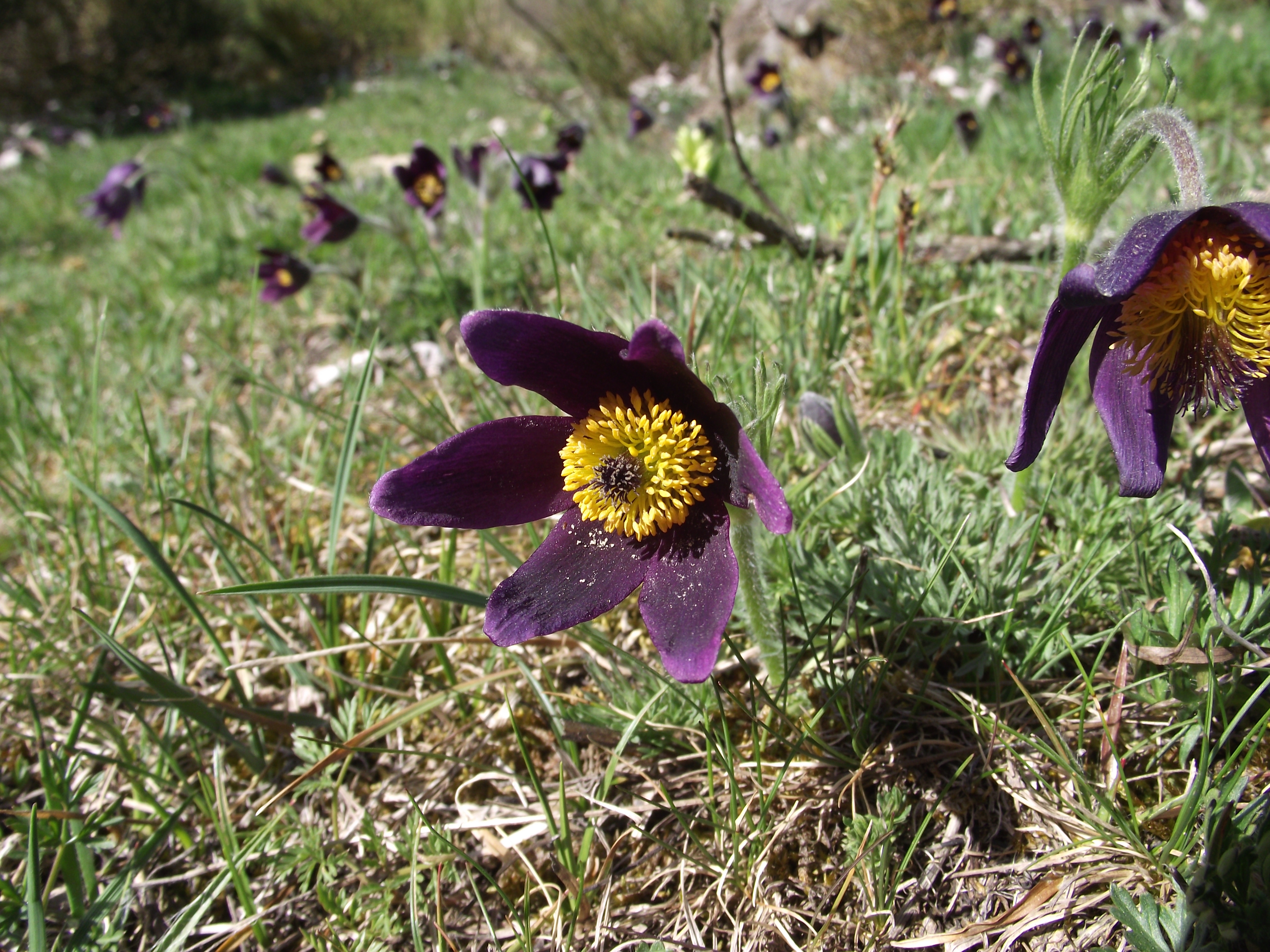 Anemone rubra sur la commune de Saint-Laurent-de-Muret (Lozère).